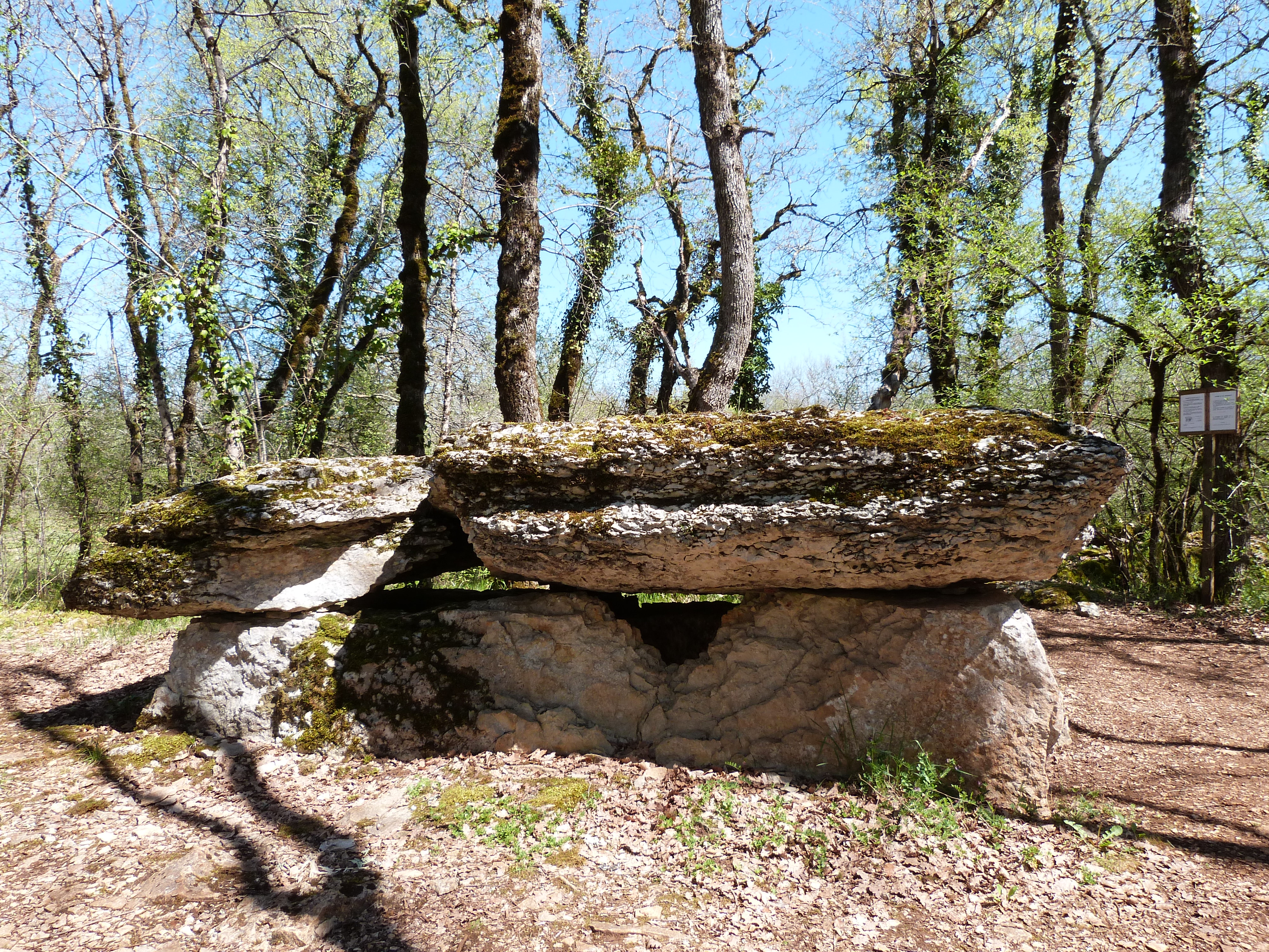 Dolmen du Bois del Rey vu de profil